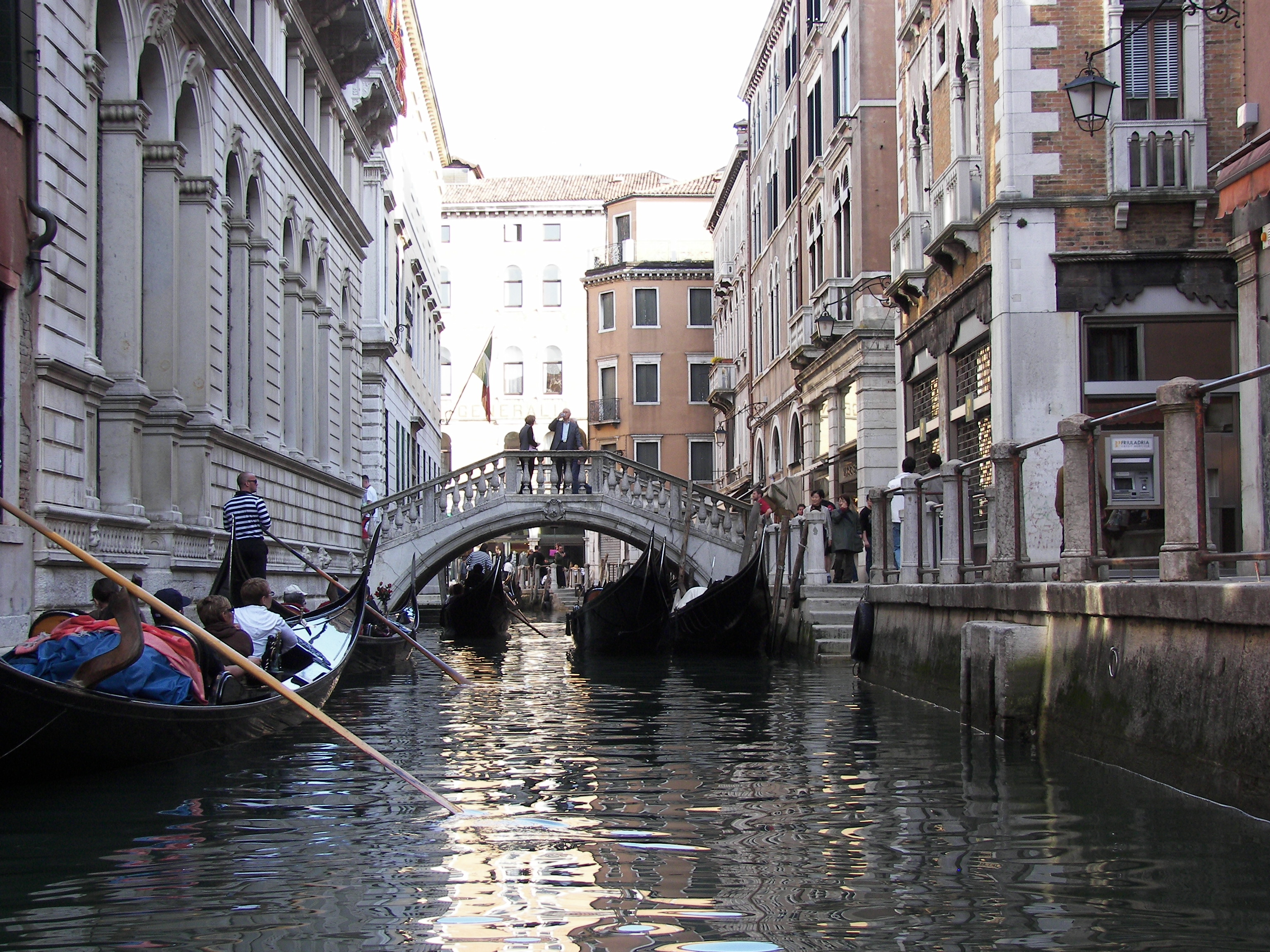 Ponte Tron o de la Piavola on Rio Orseolo looking towards Bacino Orseolo a Venezia.